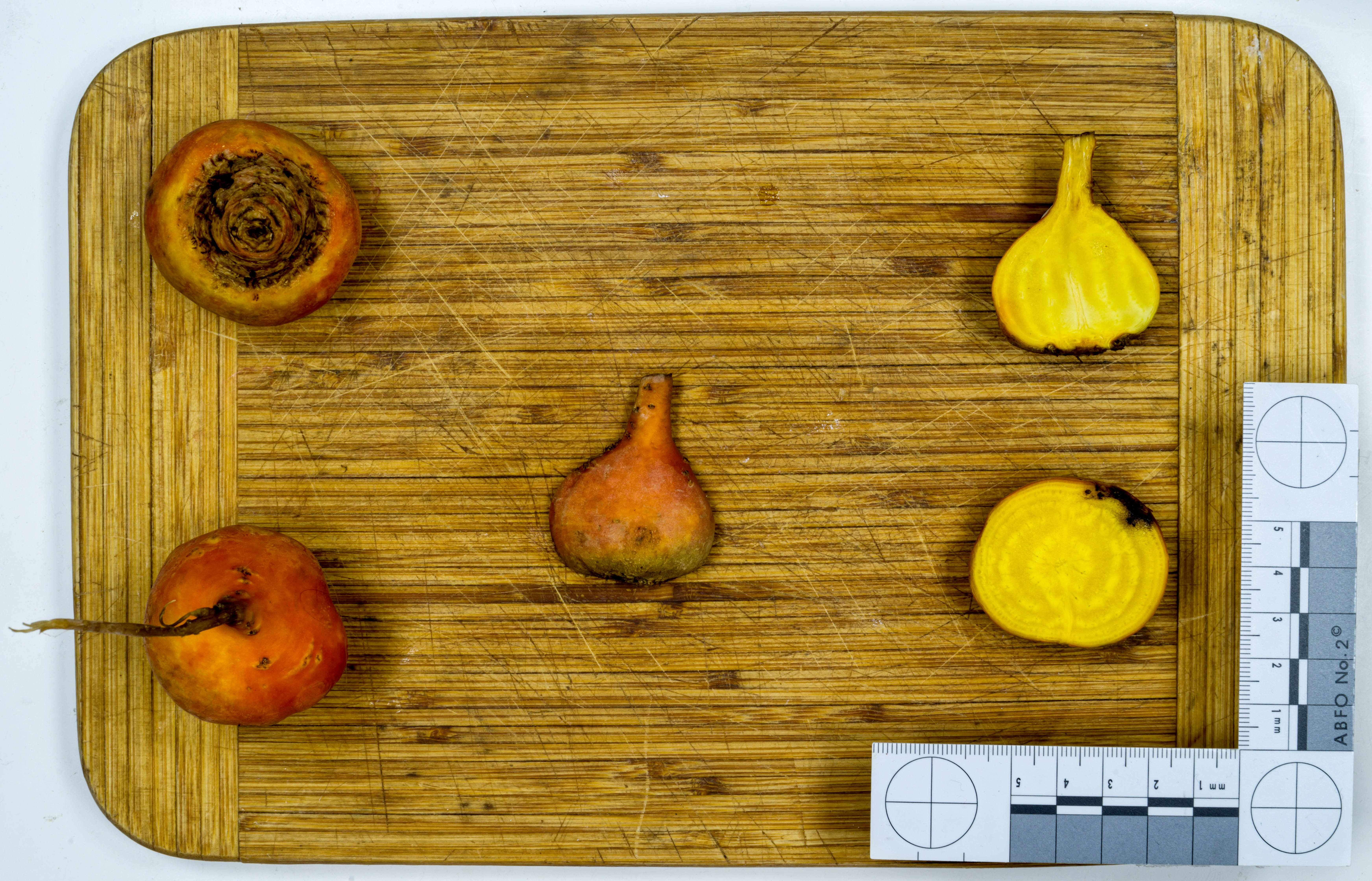 Bilder aus Freiburg im Breisgau Weiß-Rote Beete, Zuchtform der roten Beete